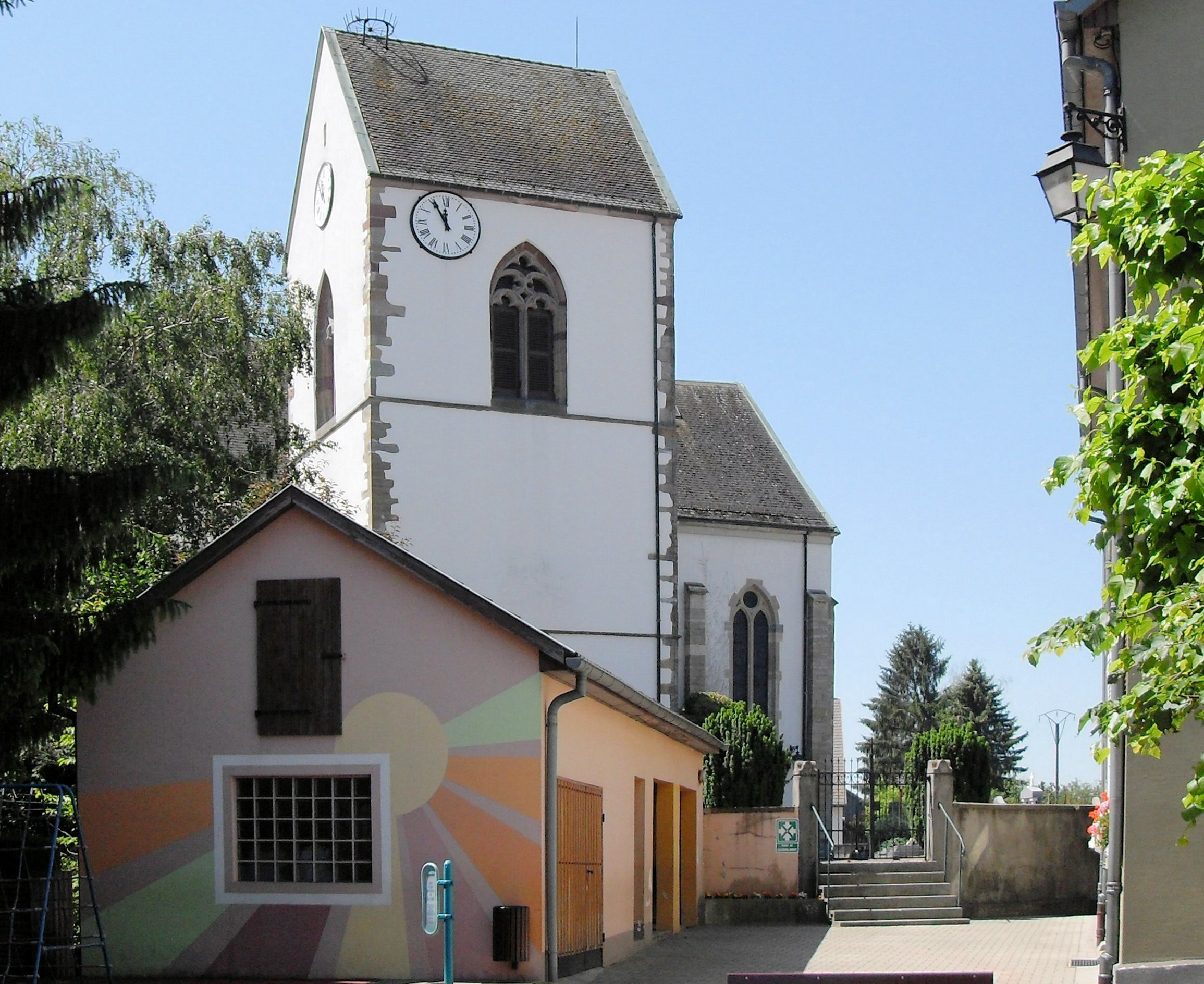 L'église Saint-Martin à Spechbach-le-Haut